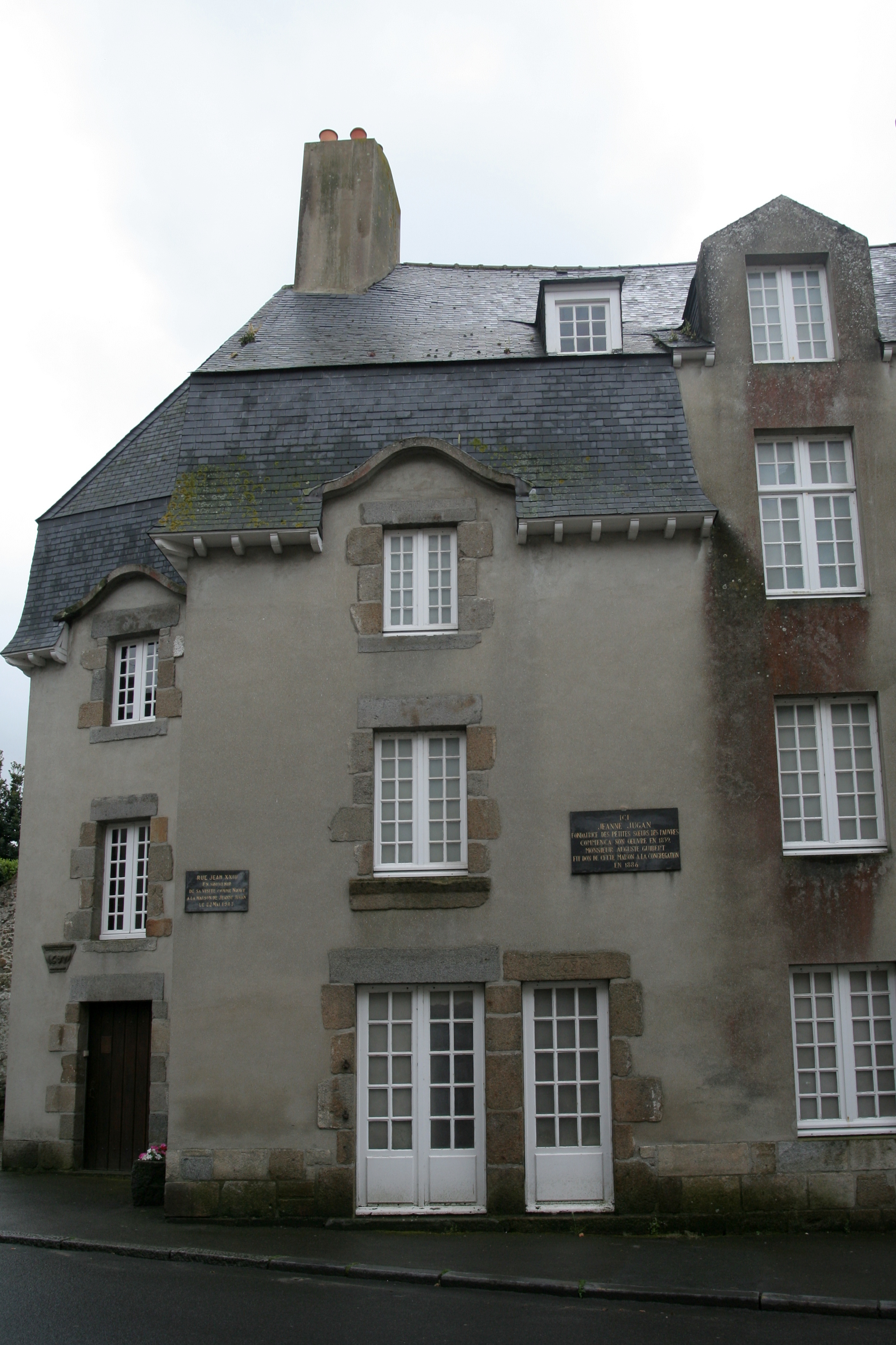 Maison Jeanne Jugan à Saint-Malo.